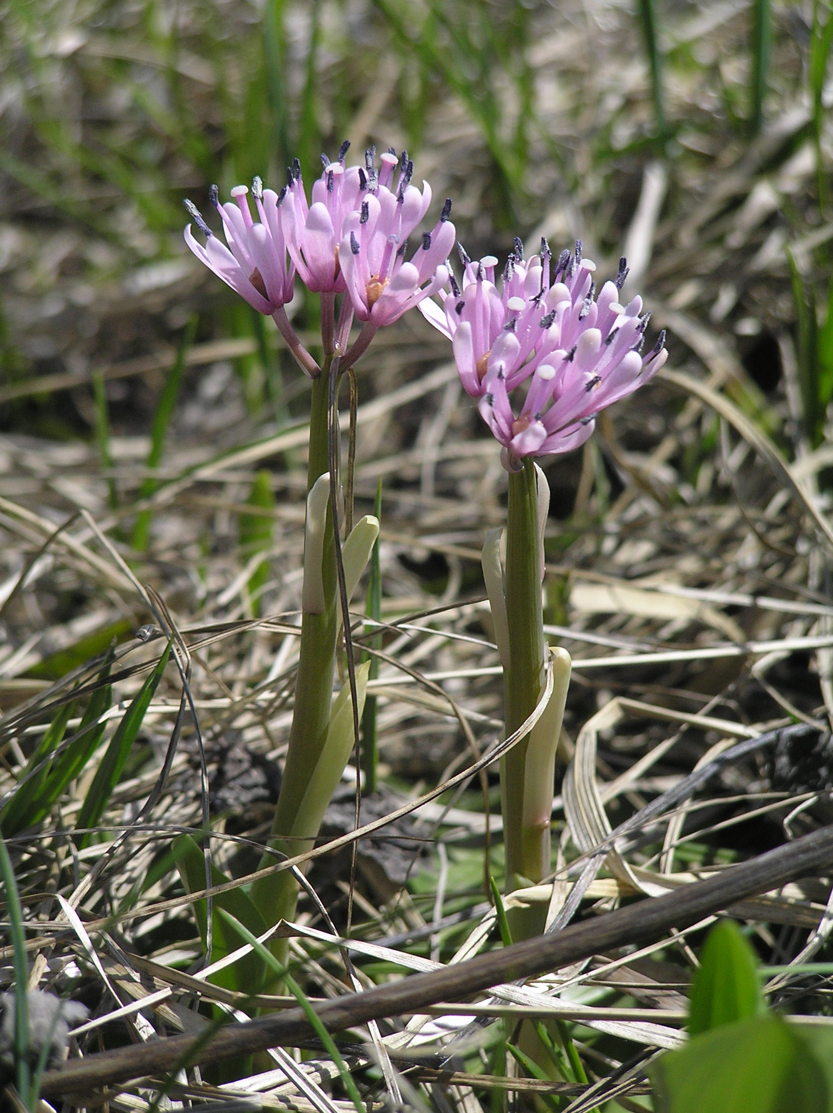 Heloniopsis orientalis 北海道雨竜沼ショウジョウバカマ